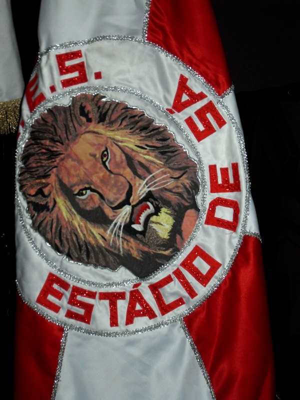 10-10-2009 Final de samba na Estácio de Sá